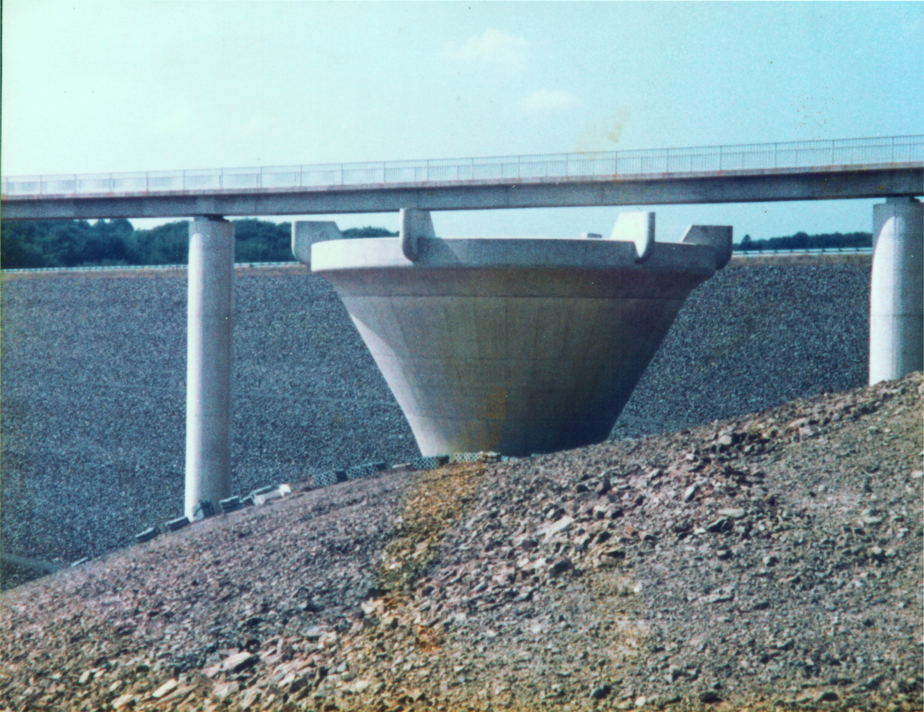 Rohrmontage an der Dhüntalsperre